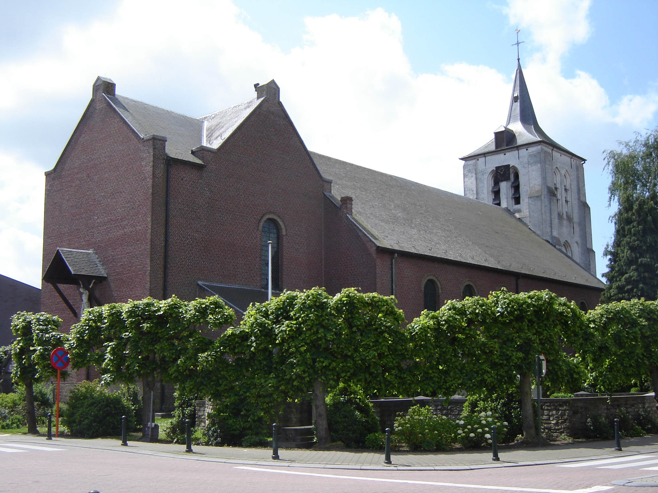 Sint-Laurentiuskerk in Zedelgem Church of Saint Lawrence, West Flanders, Belgium